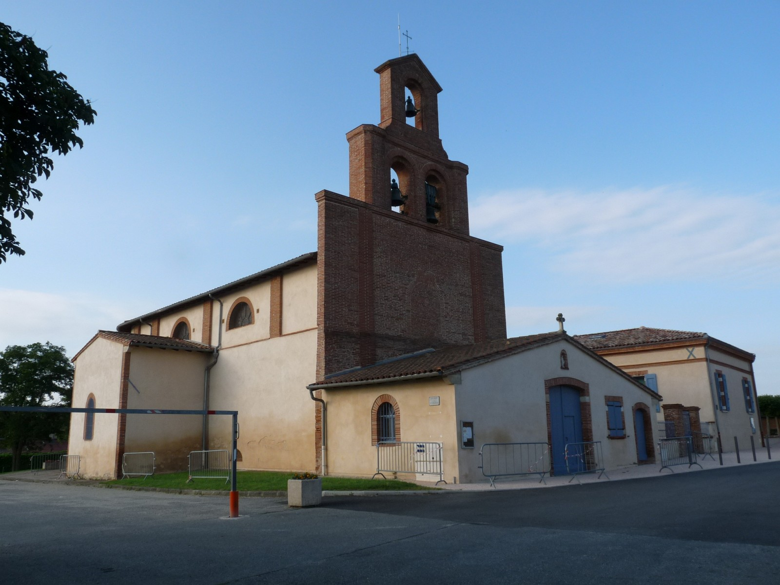 Eglise d'Odars, Haute-Garonne, France